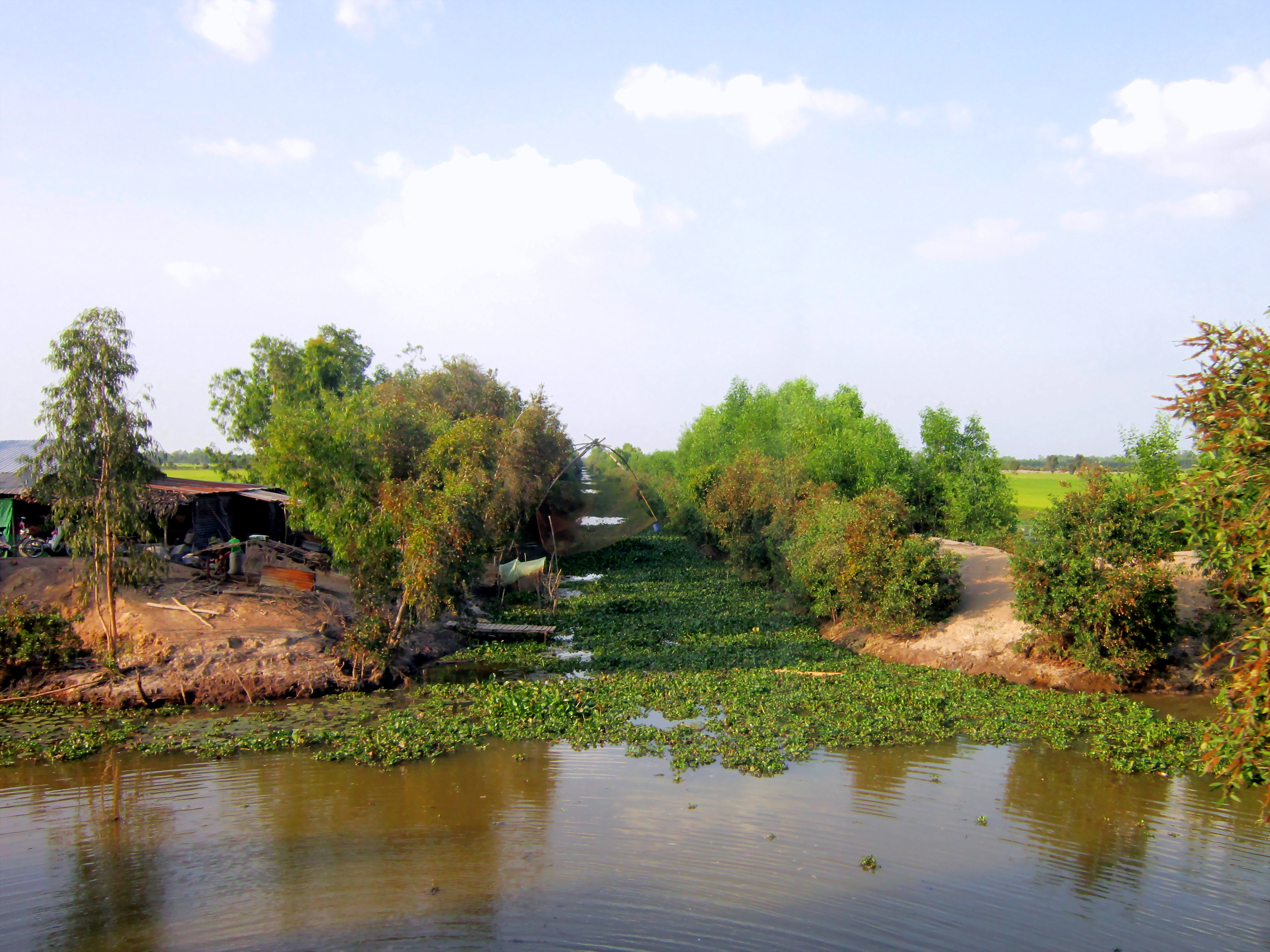 Một cảnh nông thôn ở xã Đốc Binh Kiều, huyện Tháp Mười, tỉnh Đồng Tháp, Việt Nam.